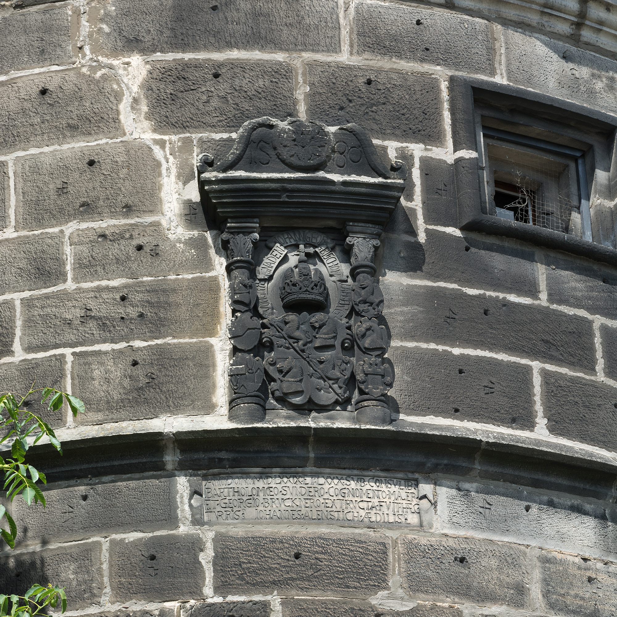 Wappen des Bamberger Fürstbischofs Johann Georg I. Zobel von Giebelstadt am Pfarr- oder Rosenturm in Kronach.